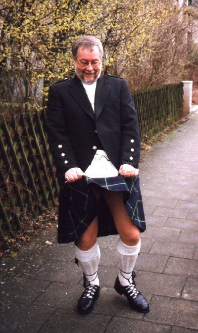 Benutzer: Nymala